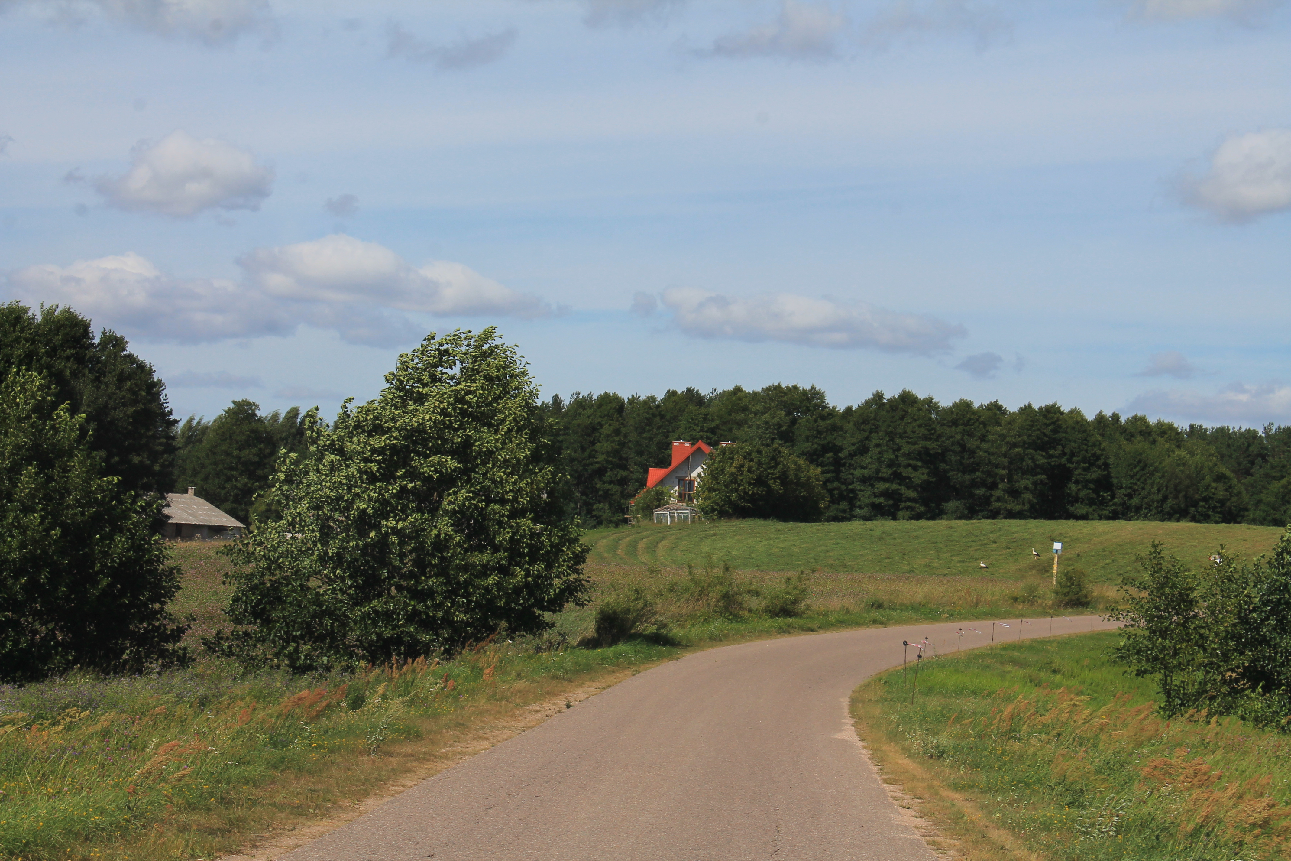 Wiłkupie, powiat suwalski. Przystanek autobusowy przy drodze.